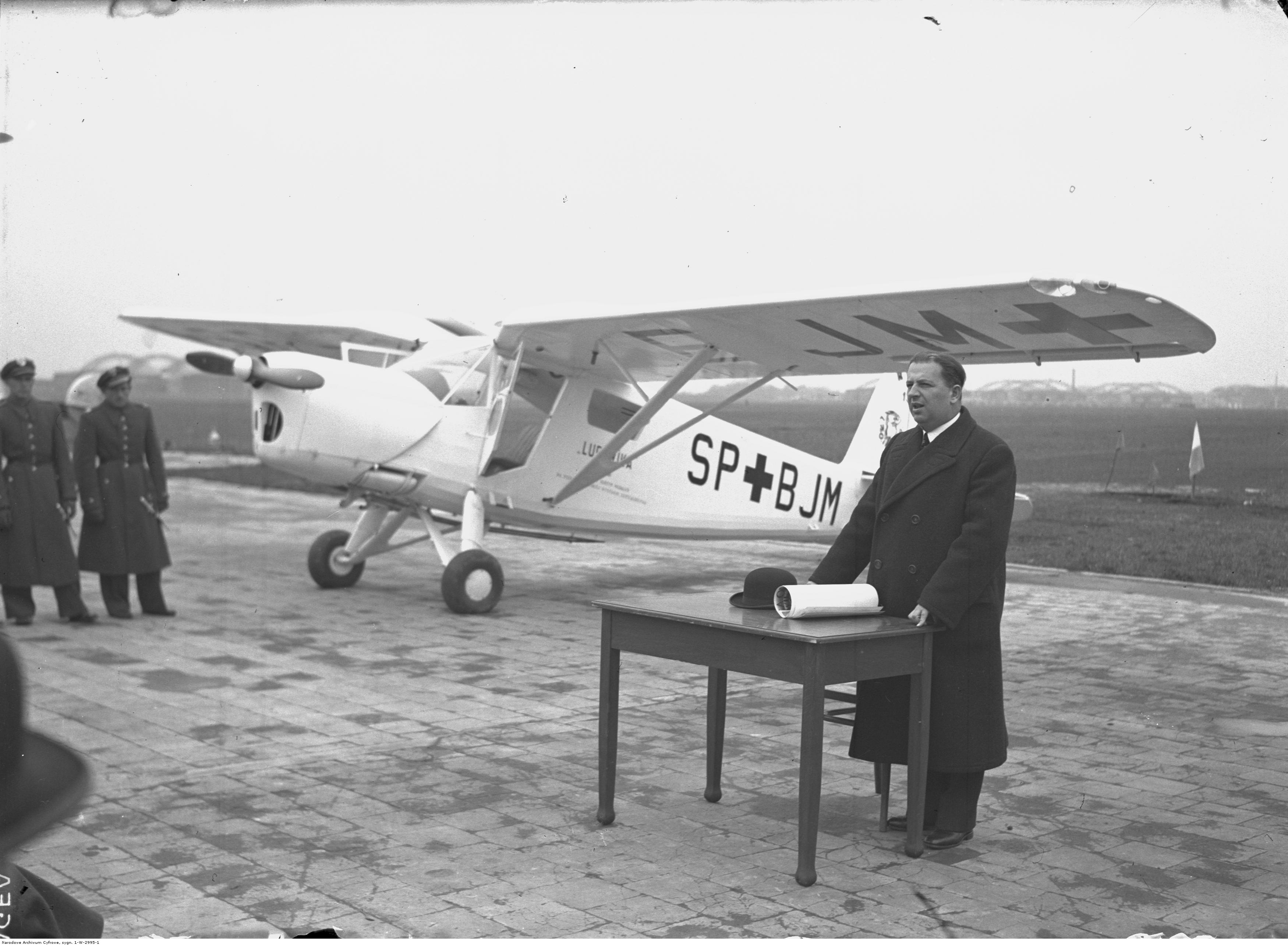 Przekazanie samolotu sanitarnego RWD -13 S i sanitarno-turystycznego RWD -13 ST 2 Pułkowi Lotniczemu i Aeroklubowi Krakowskiemu. Prezes Aeroklubu Krakowskiego dr Piotr Małaszyński przemawia w czasie uroczystości. Obok widoczny samolot RWD -13 ST "Ludovika" o numerze SP BJM. Koncern Ilustrowany Kurier Codzienny - Archiwum Ilustracji. Sygnatura: 1-W-2995-1